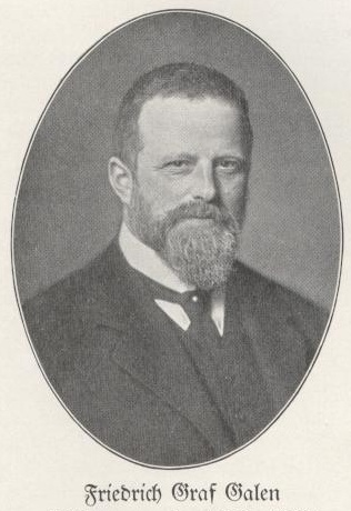 Friedrich Mathias Graf von Galen (1865-1918), Reichstagsabgeordneter, Zentrum